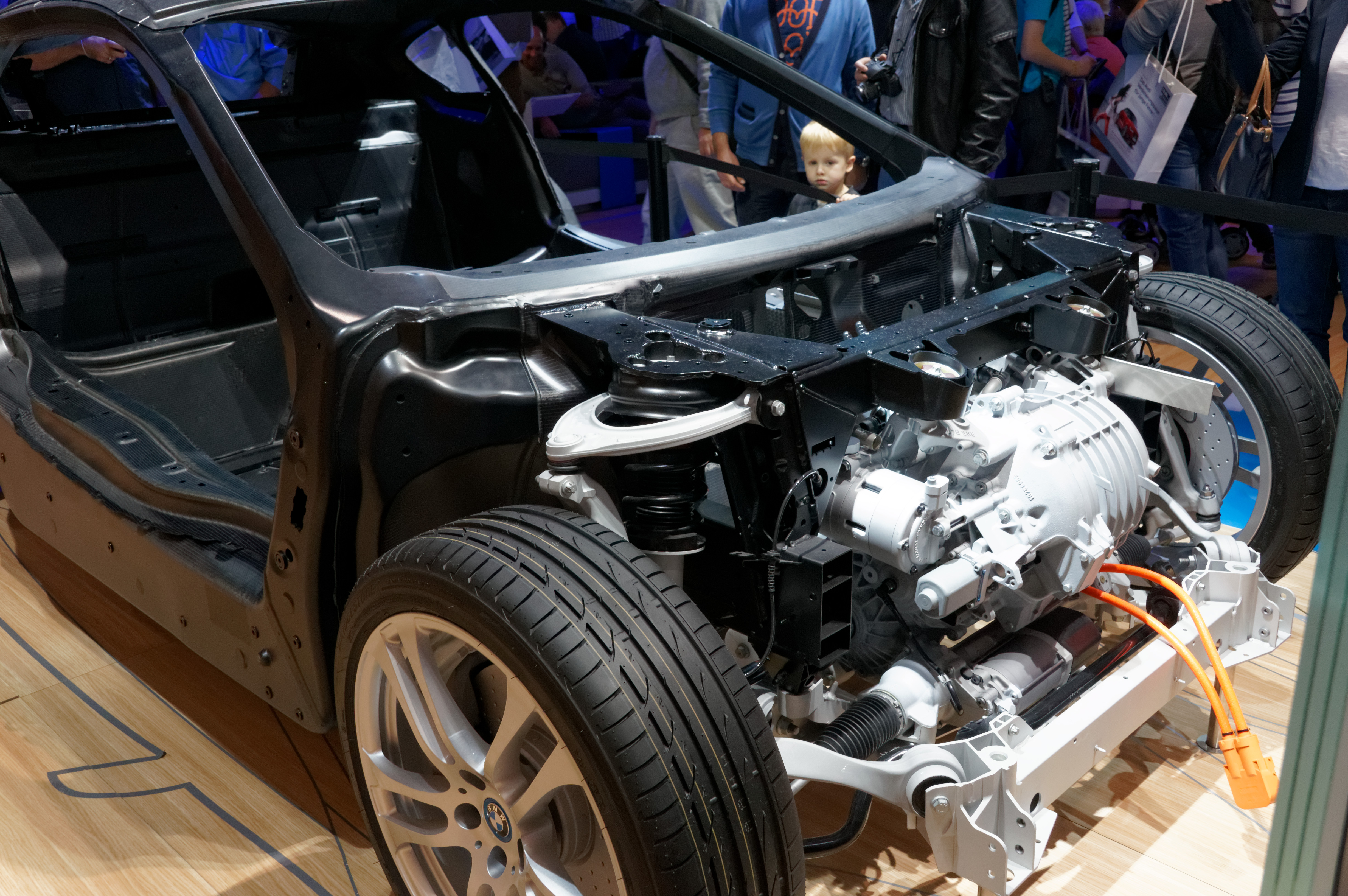 DSC01653_DxO